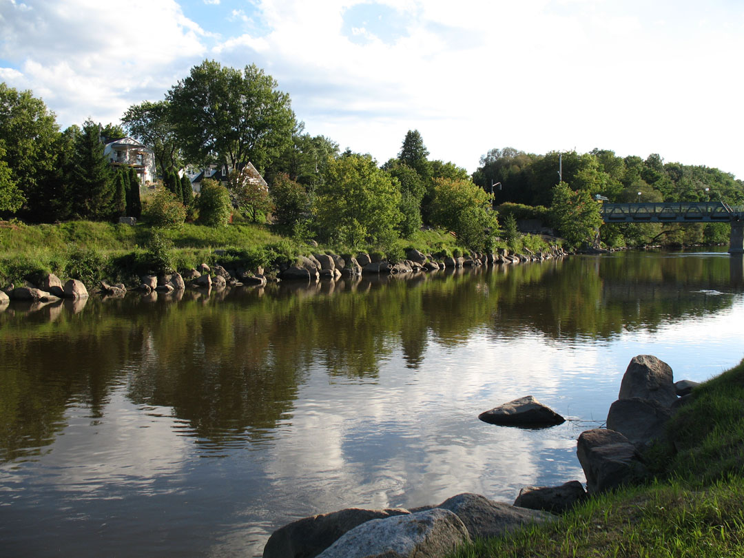 La Rivière Saint-Charles dans le quartier Saint-Sauveur à Québec, (Québec), Canada. À droite, le pont Scott.